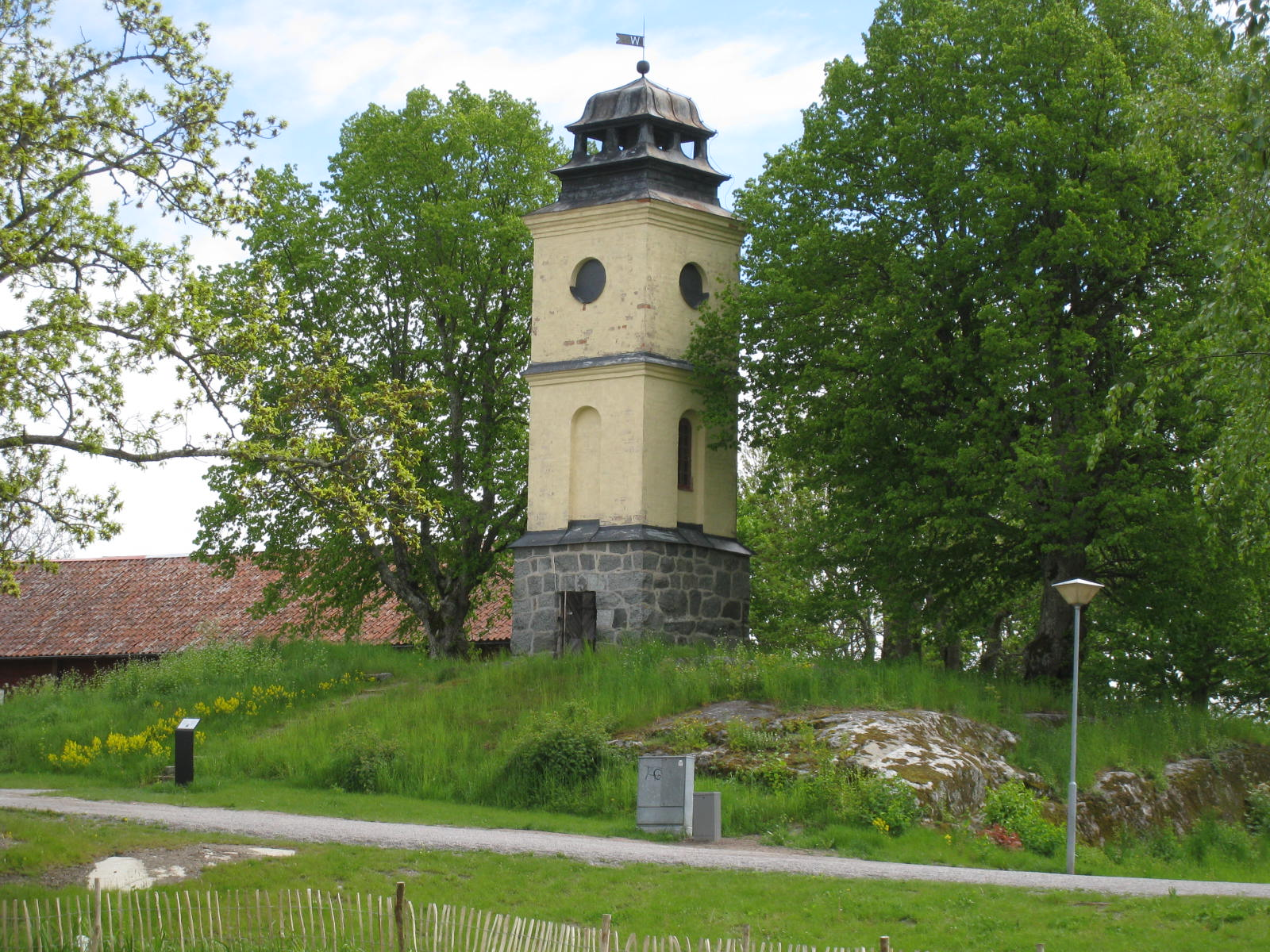 Klockstapeln på Wenngarn, f.d. transformatorstation. På 1950-talet ombyggdes stationen till klockstapel av arkitekt Karl-Erik Hjalmarsson.